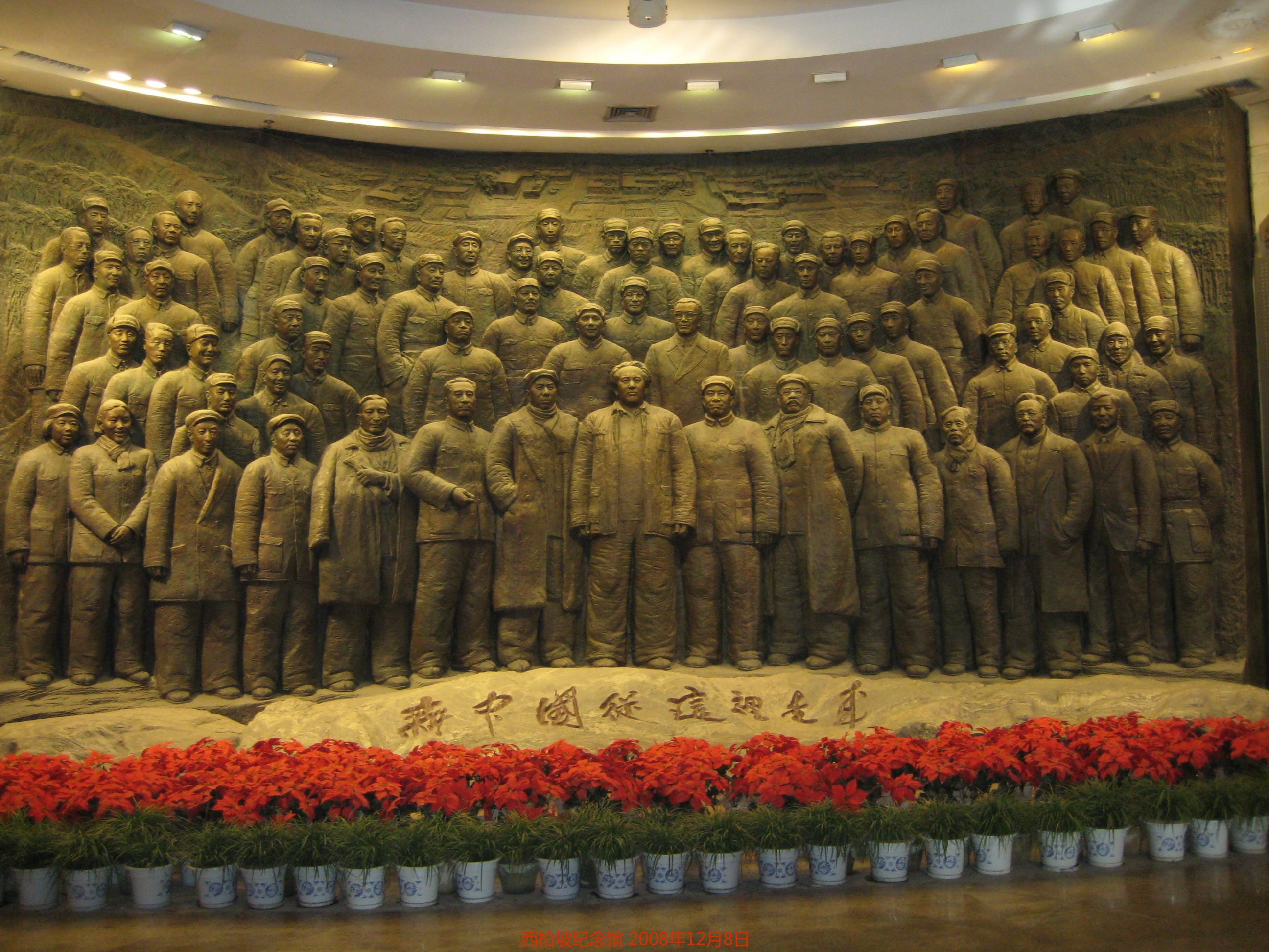 西柏坡纪念馆77位领导人塑像群